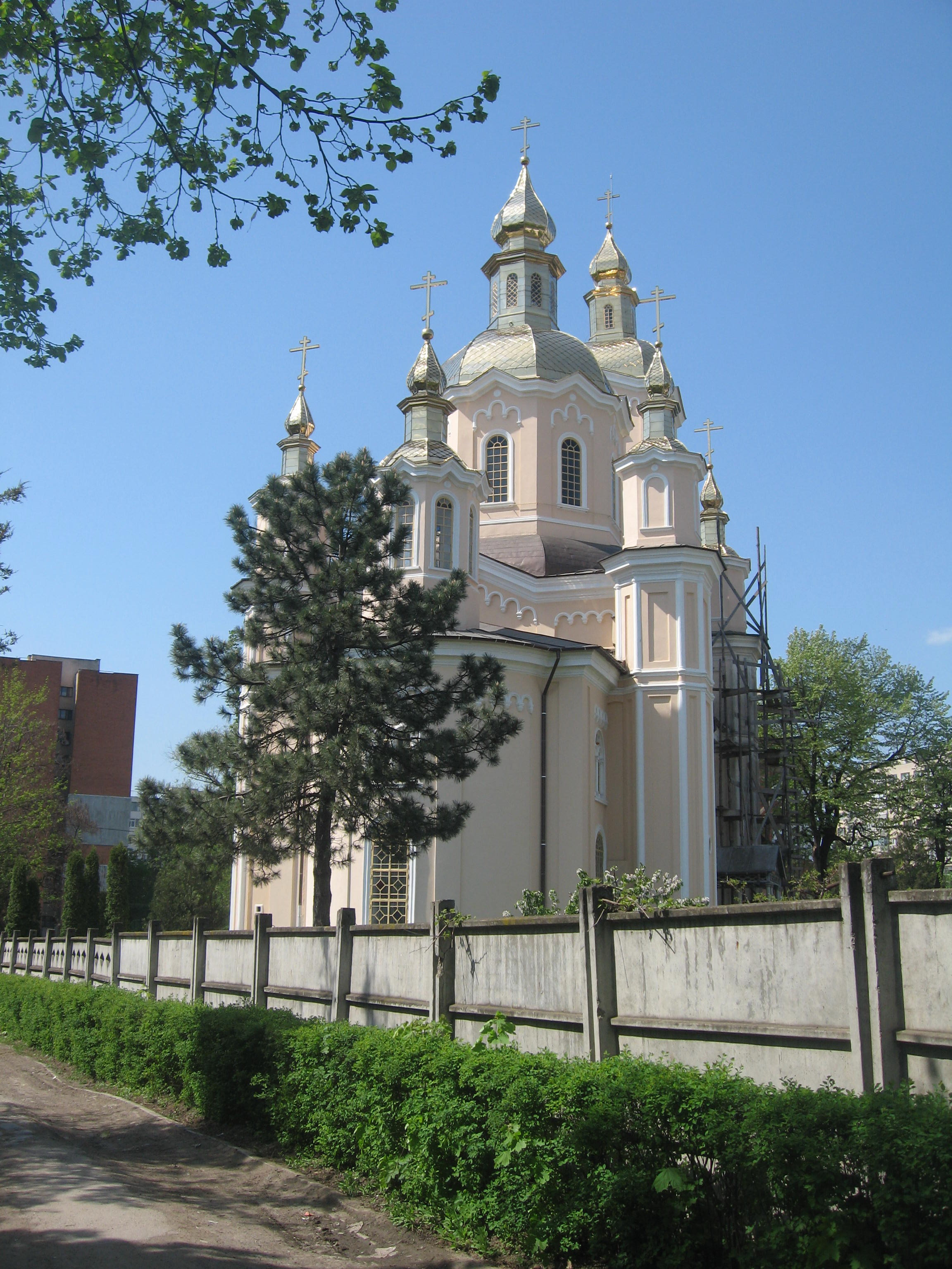 Biserica lipovenească din Iași